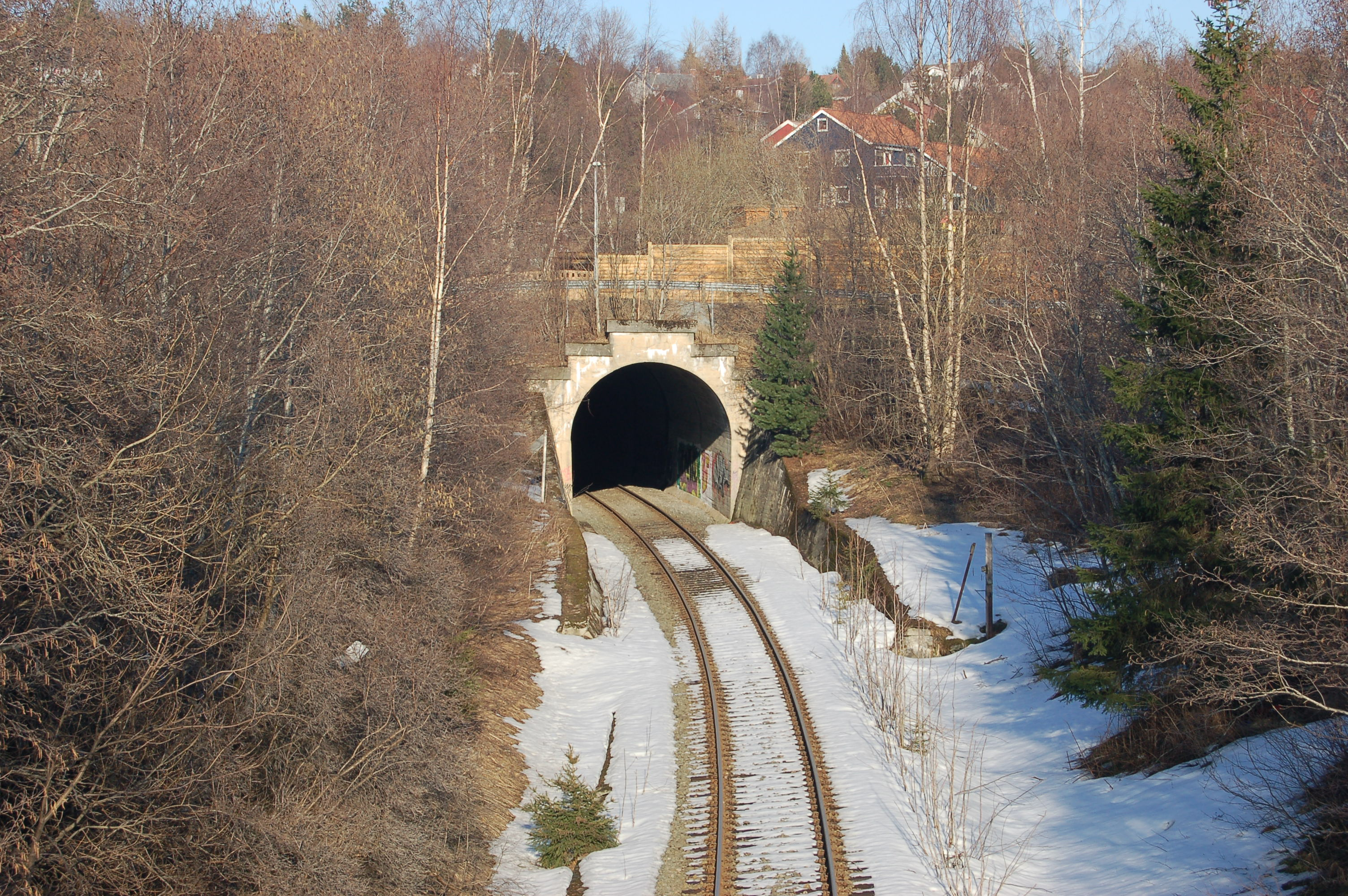 Entrence to Tyholt Tunnel from Lerkendal